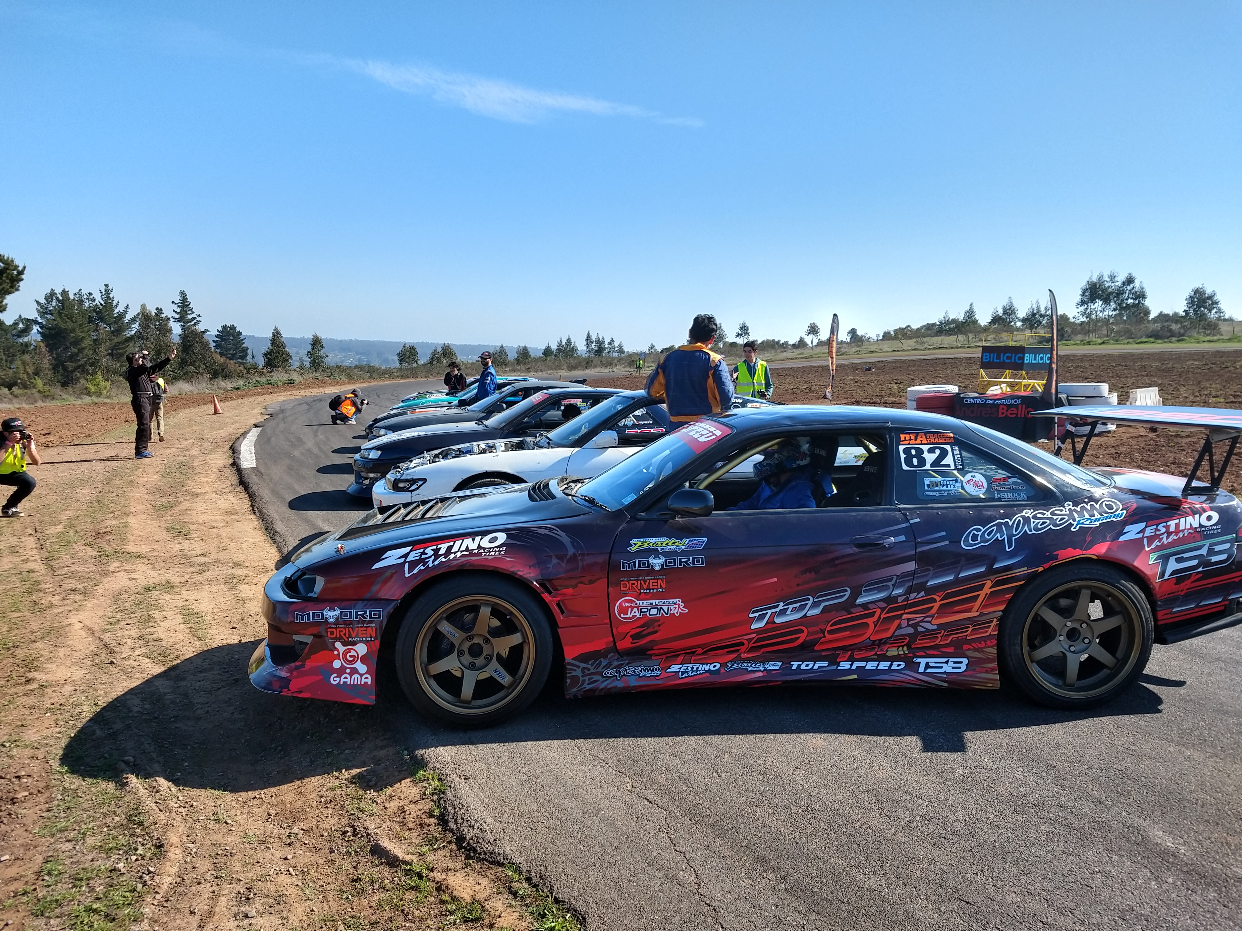 categoria PRO alineacion Leydaring